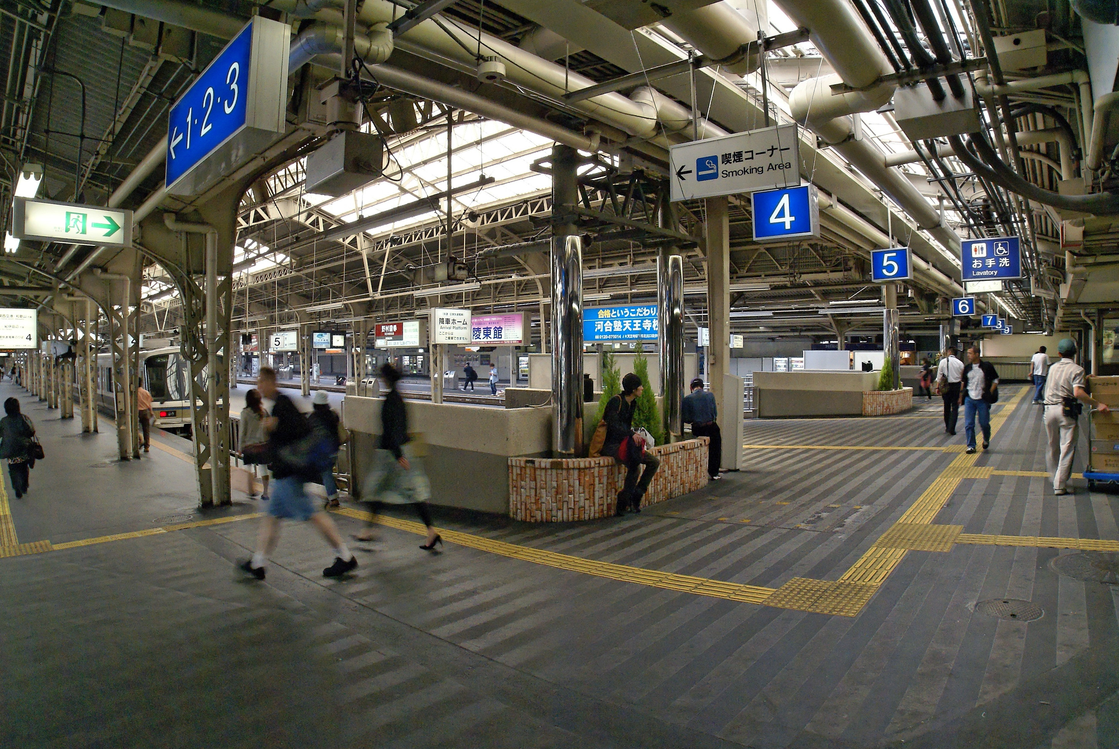 Tennōji Station in Osaka, Osaka prefecture, Japan